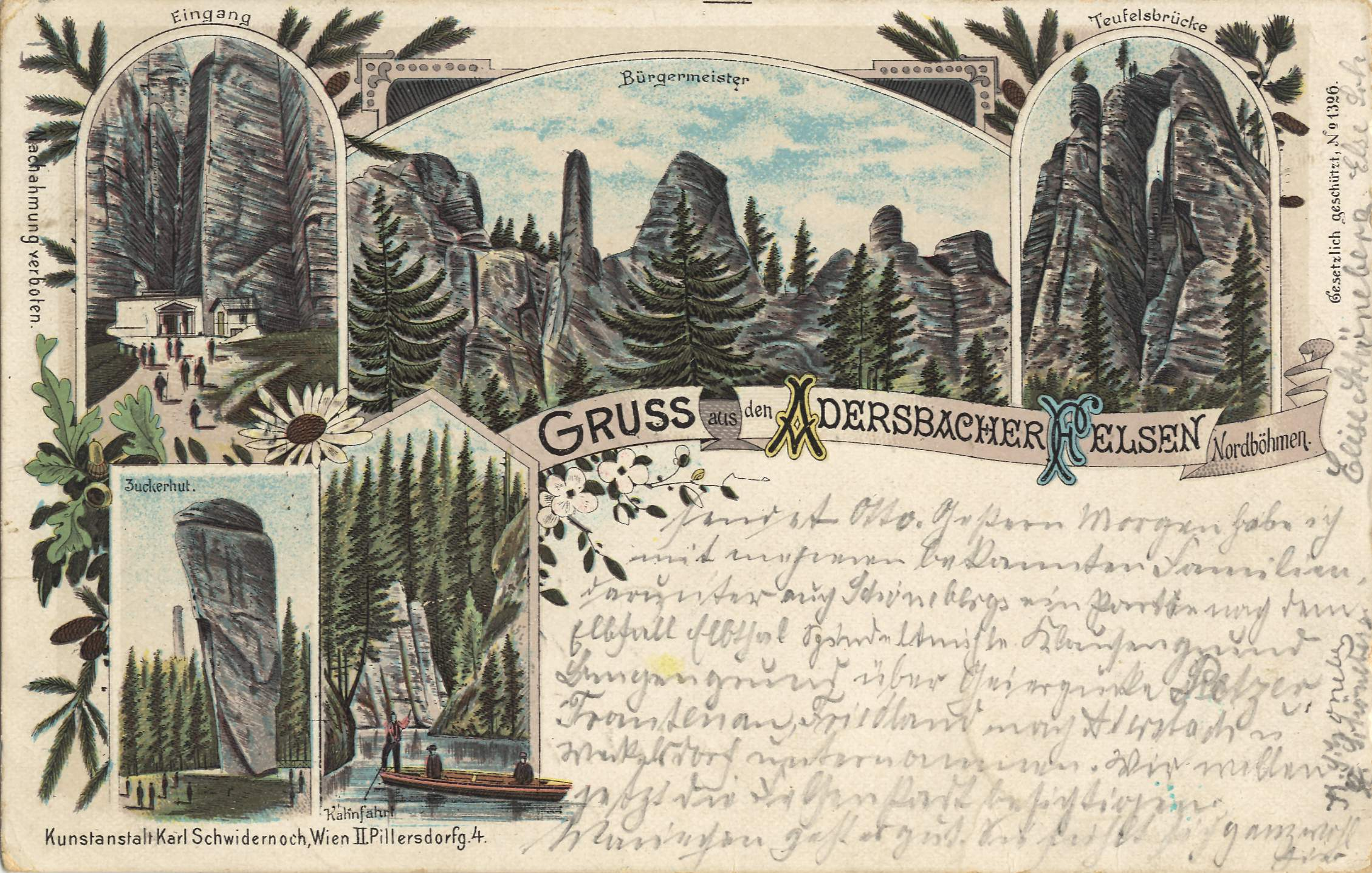 Adršpašskoteplické skály